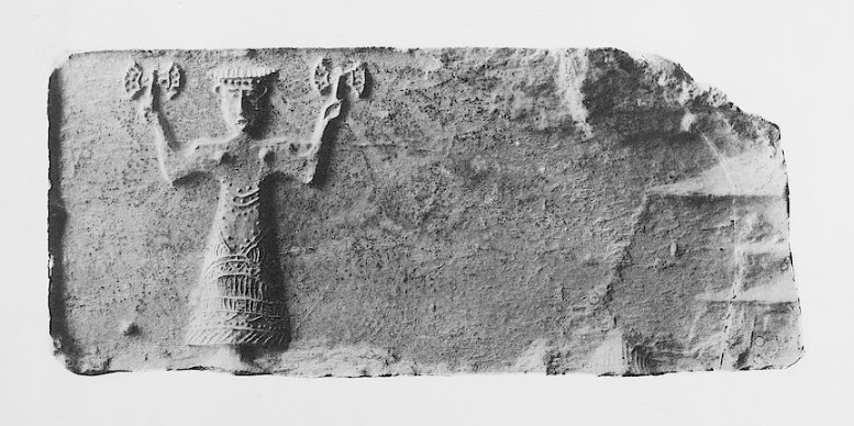 Fotografie des Abdruckes einer Gussform aus Schiefer. Gefunden im Oktober 1899 nordwestlich des Ortes Palekastro.